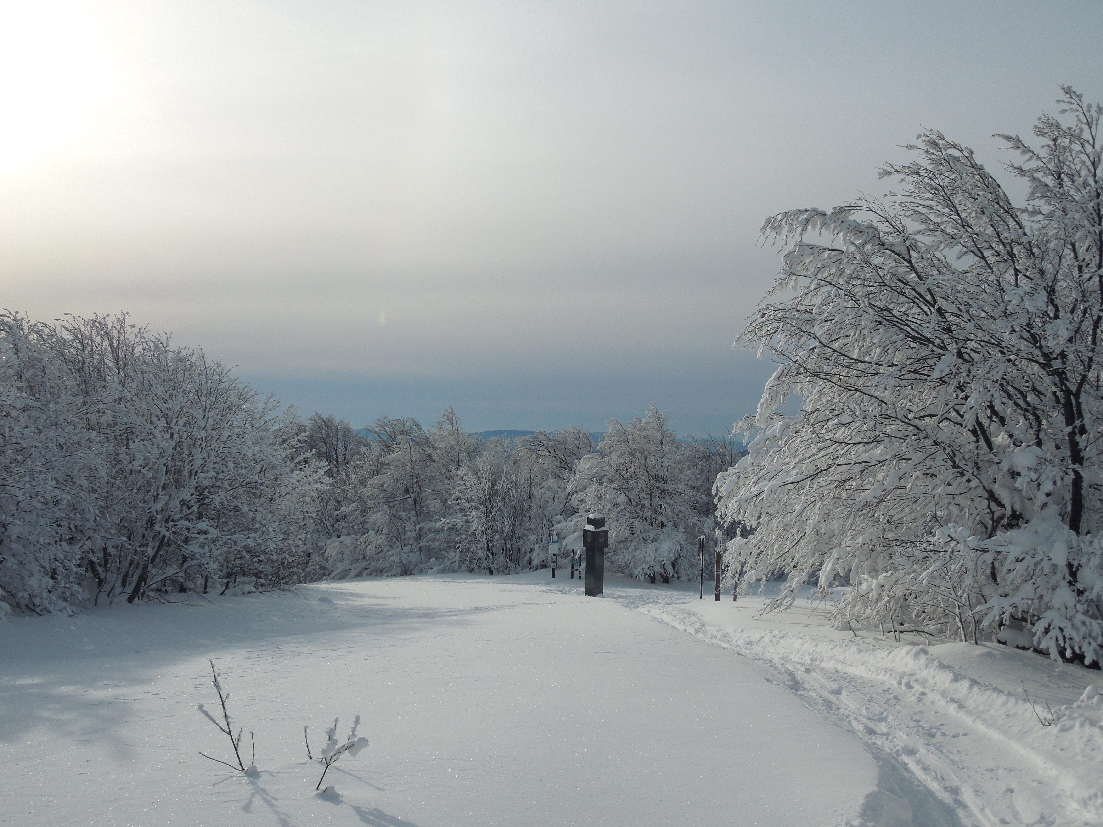 Trojmedzie na Kremenci v zime